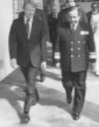 Series: Jimmy Carter's Presidential Photographs , 1/20/1977 - 1/20/1981 Collection: White House Staff Photographers Collection, 1/20/1977 - 1/20/1981